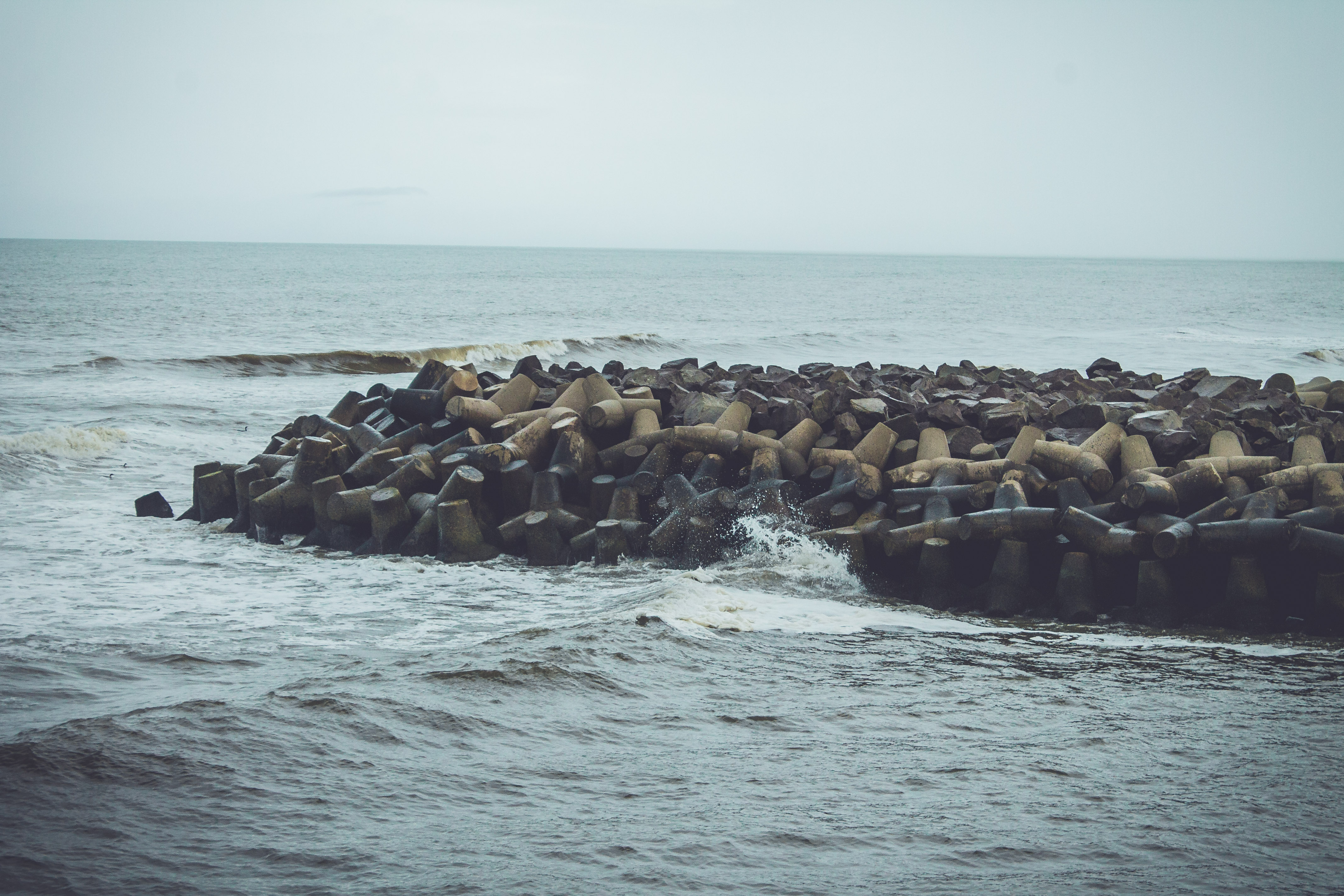 Molhes da Barra do Chuí